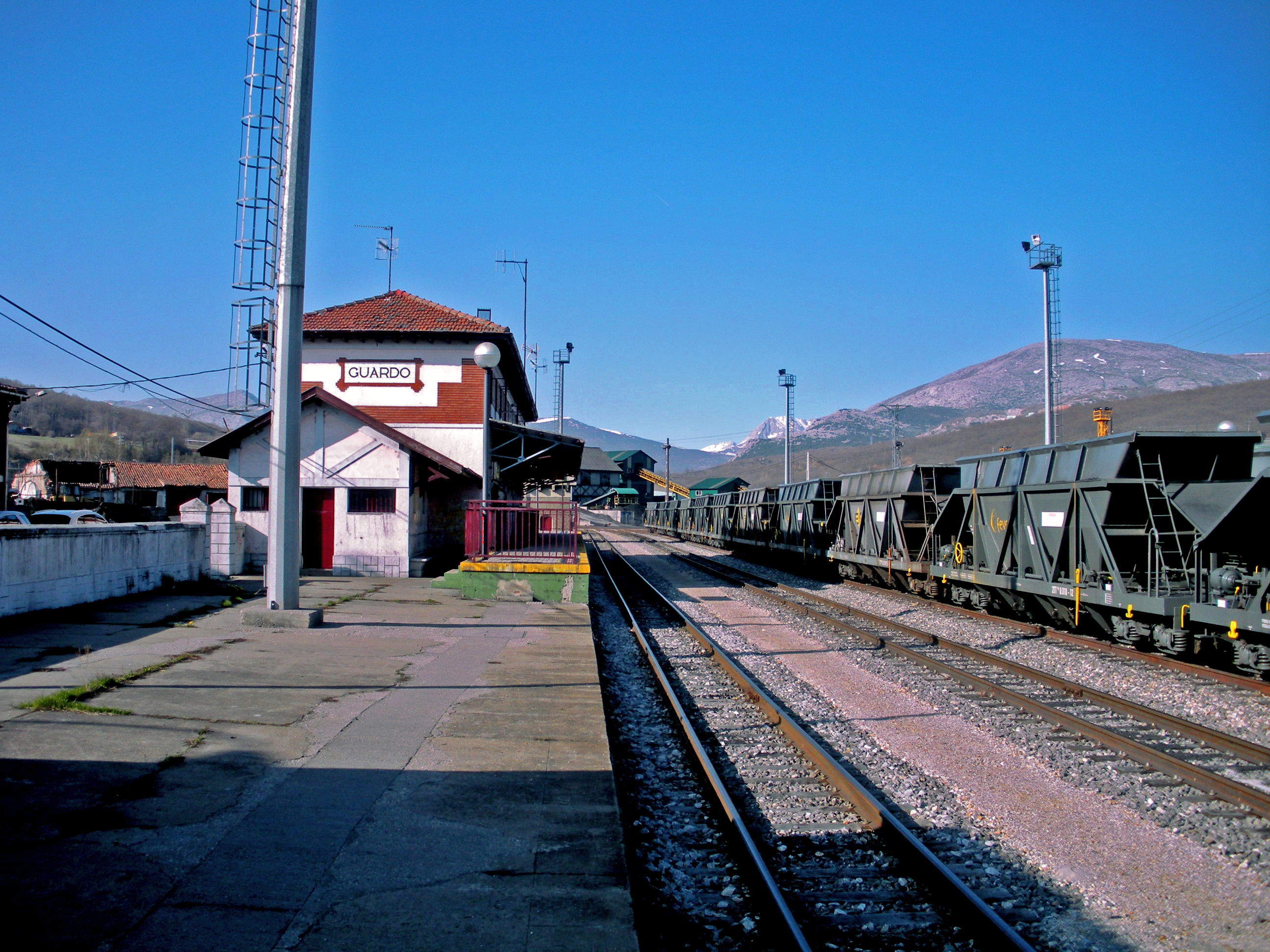 Estación de FEVE de Guardo, Palencia (España).